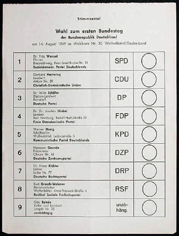 Wahlschein